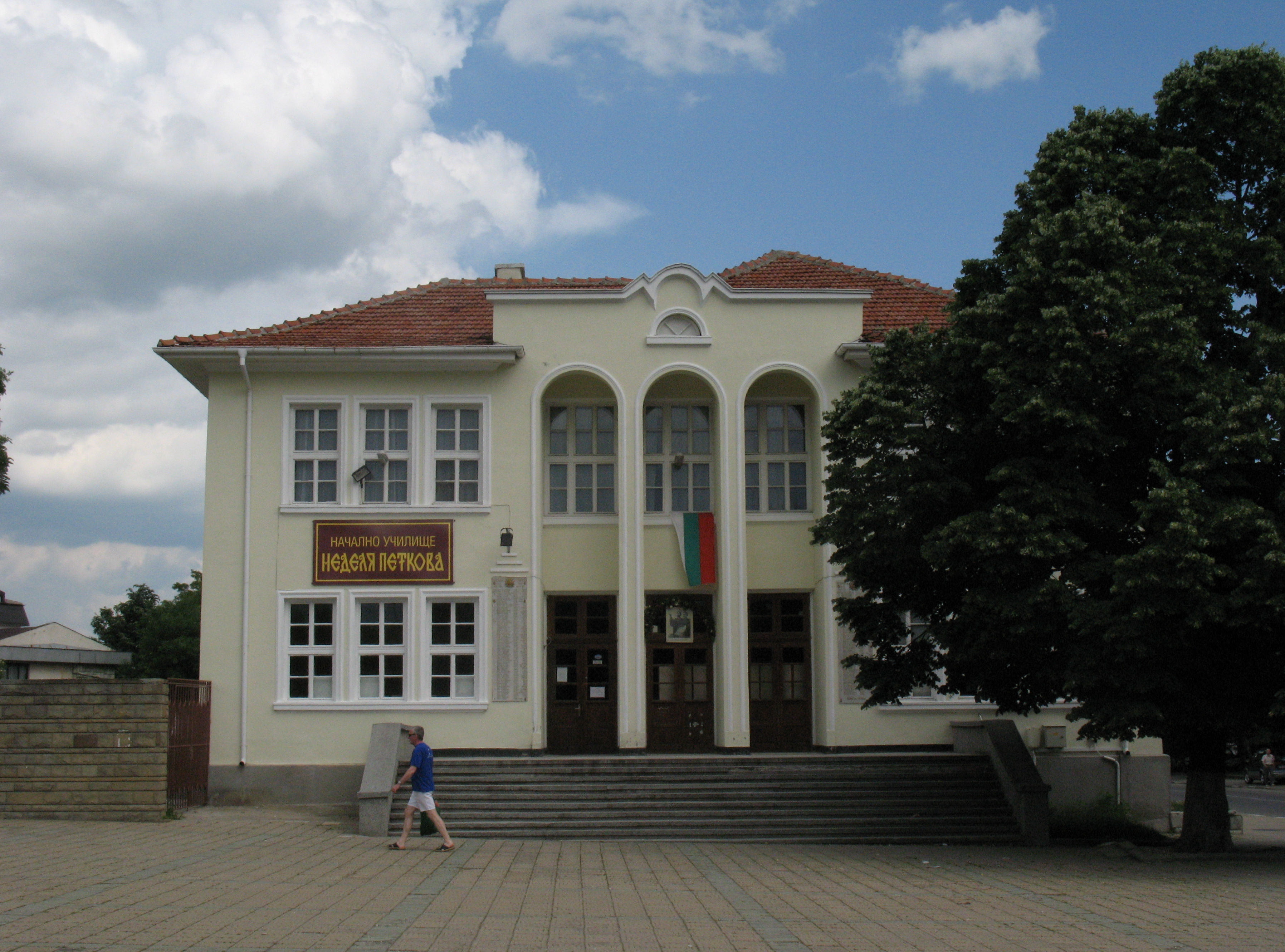 Сопот_4115